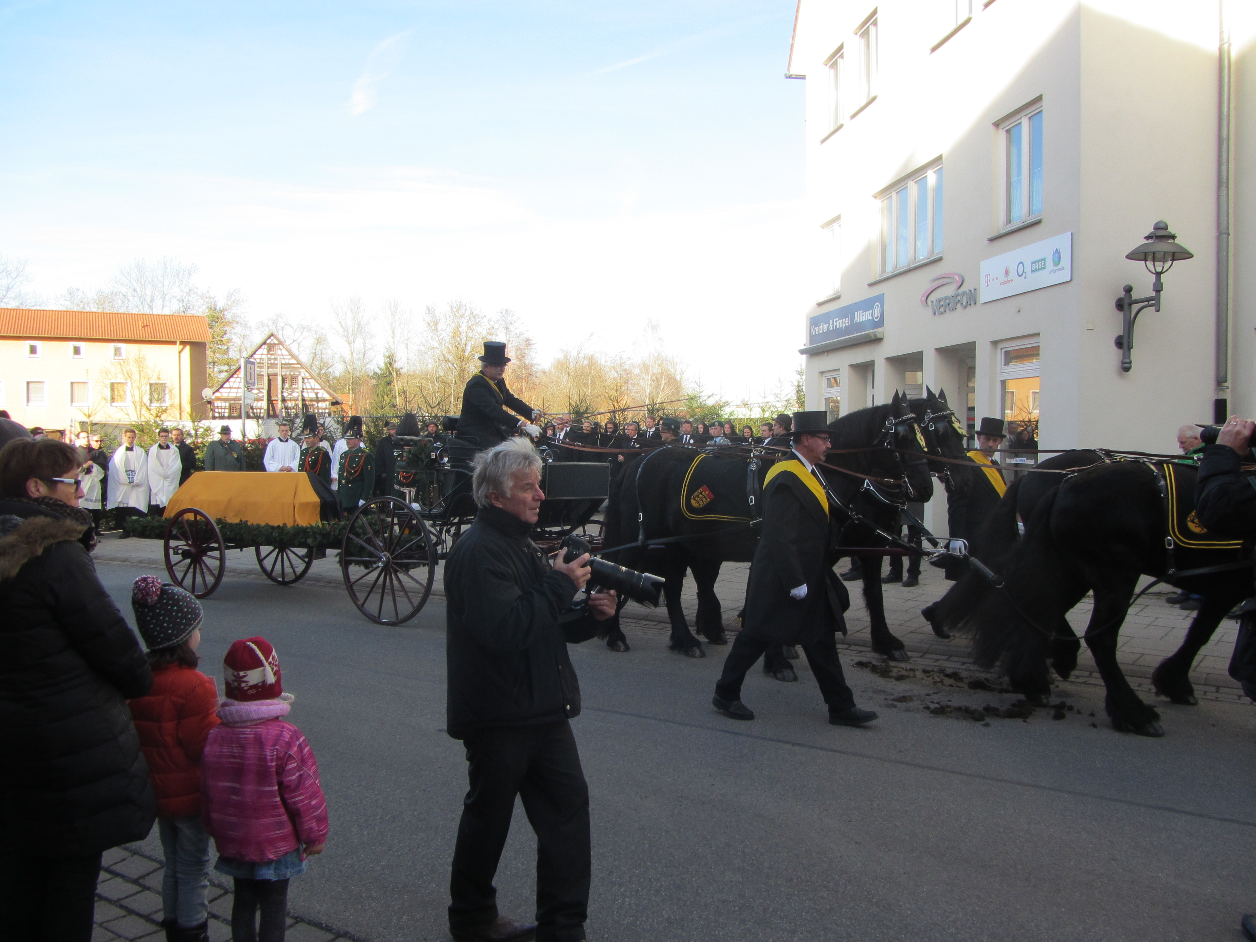 Requiem